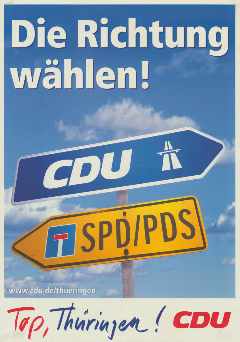 Die Richtung wählen! CDU (Autobahn) (Sackgasse) SPD/PDS Top, Thüringen! CDU Abbildung: Verkehrsschilder Richtung Autobahn bzw. Sackgasse Plakatart: Motiv-/Textplakat Auftraggeber: CDU LV Thüringen Objekt-Signatur: 10-037 : 307 Bestand: Landtagswahlplakate Thüringen (10-037) GliederungBestand10-18: Landtagswahlplakate Thüringen (10-037) » CDU Lizenz: KAS/ACDP 10-037 : 307 CC-BY-SA 3.0 DE